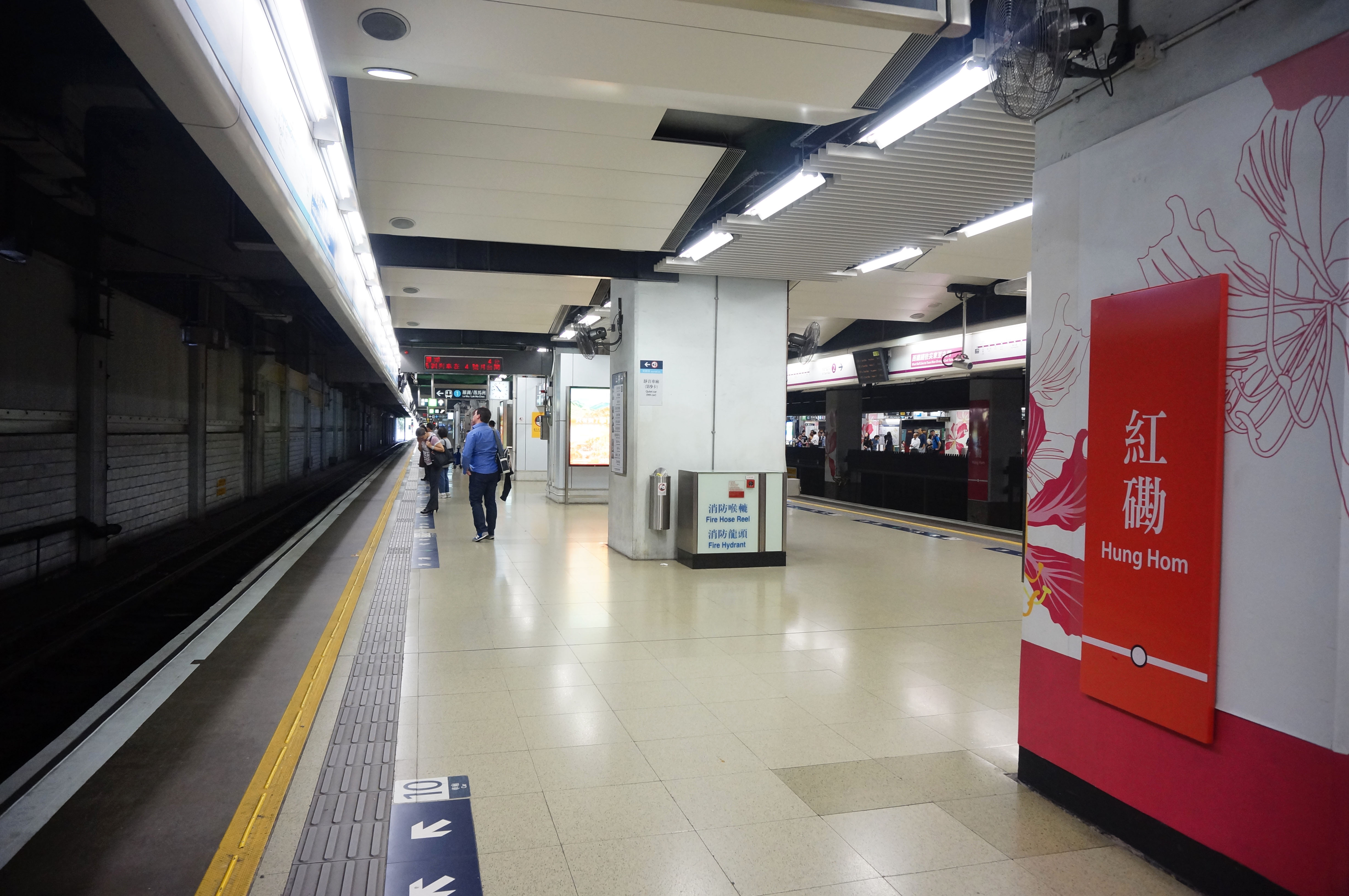 港鐵紅磡站月台